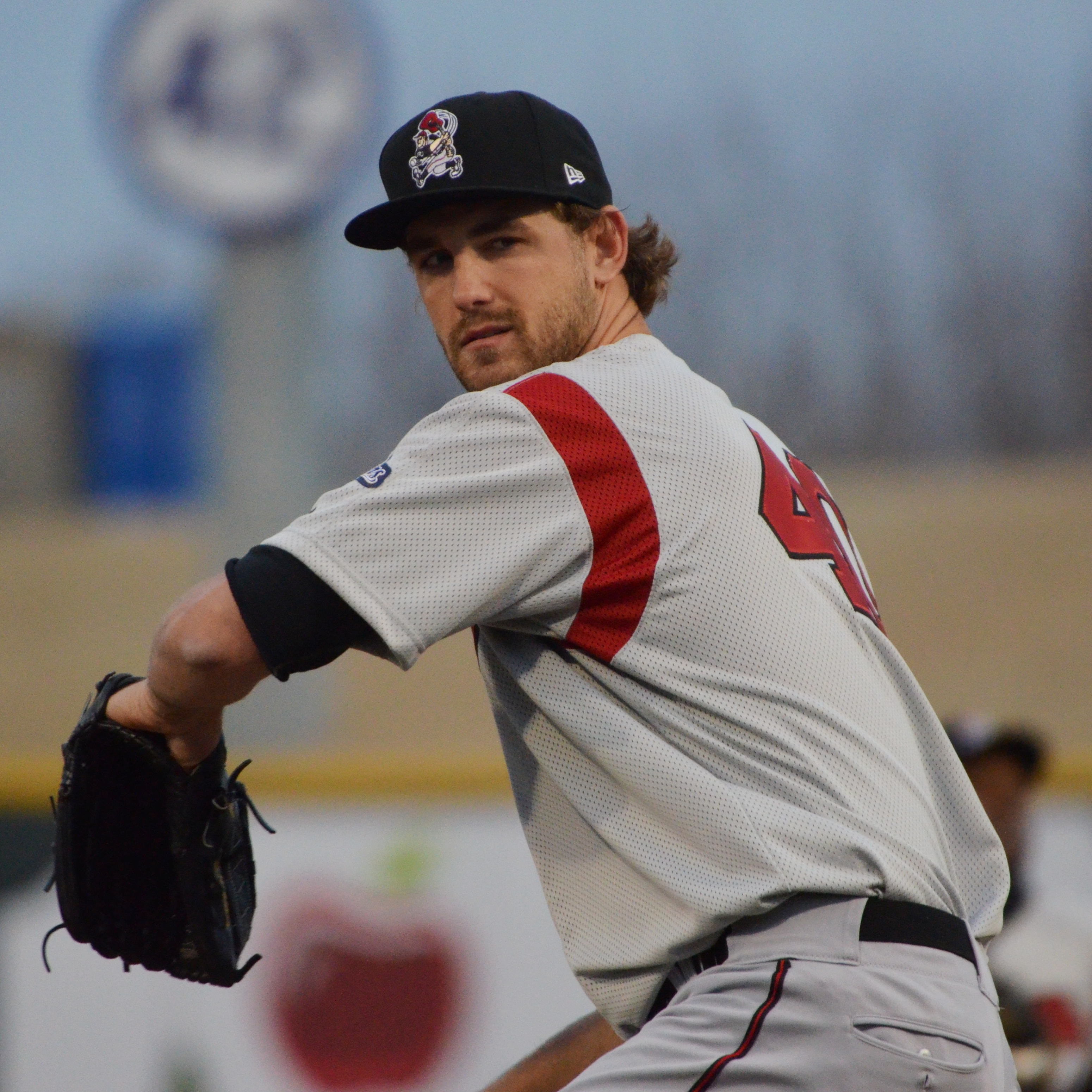 Johnny Hellweg